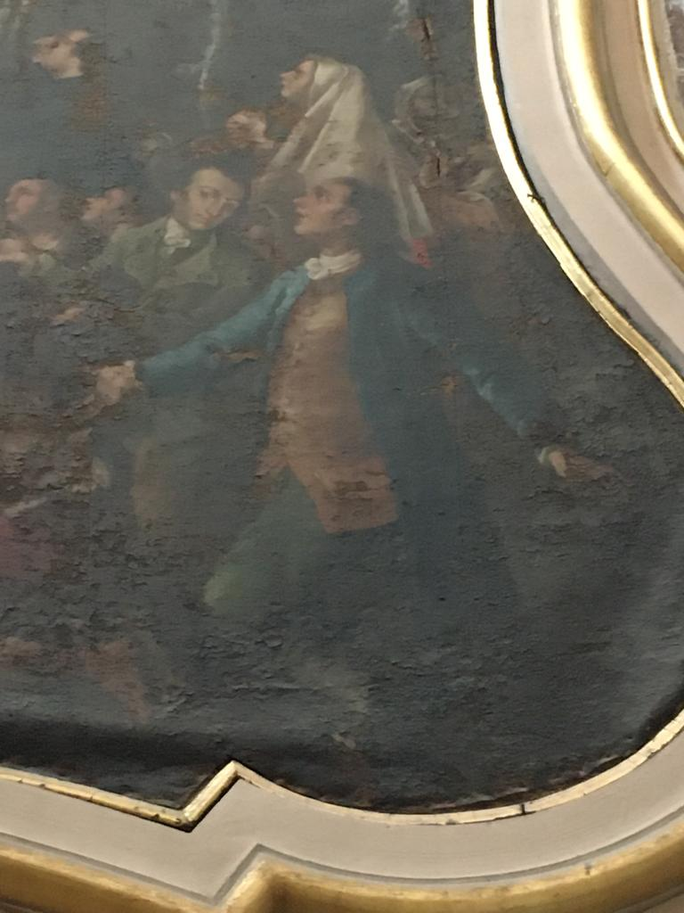 Dettaglio del quadro di Domenico Carella raffigurante il Miracolo degli ulivi, sulll'altare della Madonna della Fontana nella chiesa matrice di Francavilla Fontana. Si vede (con la giacca blu) l'autore autoraffiguratosi.